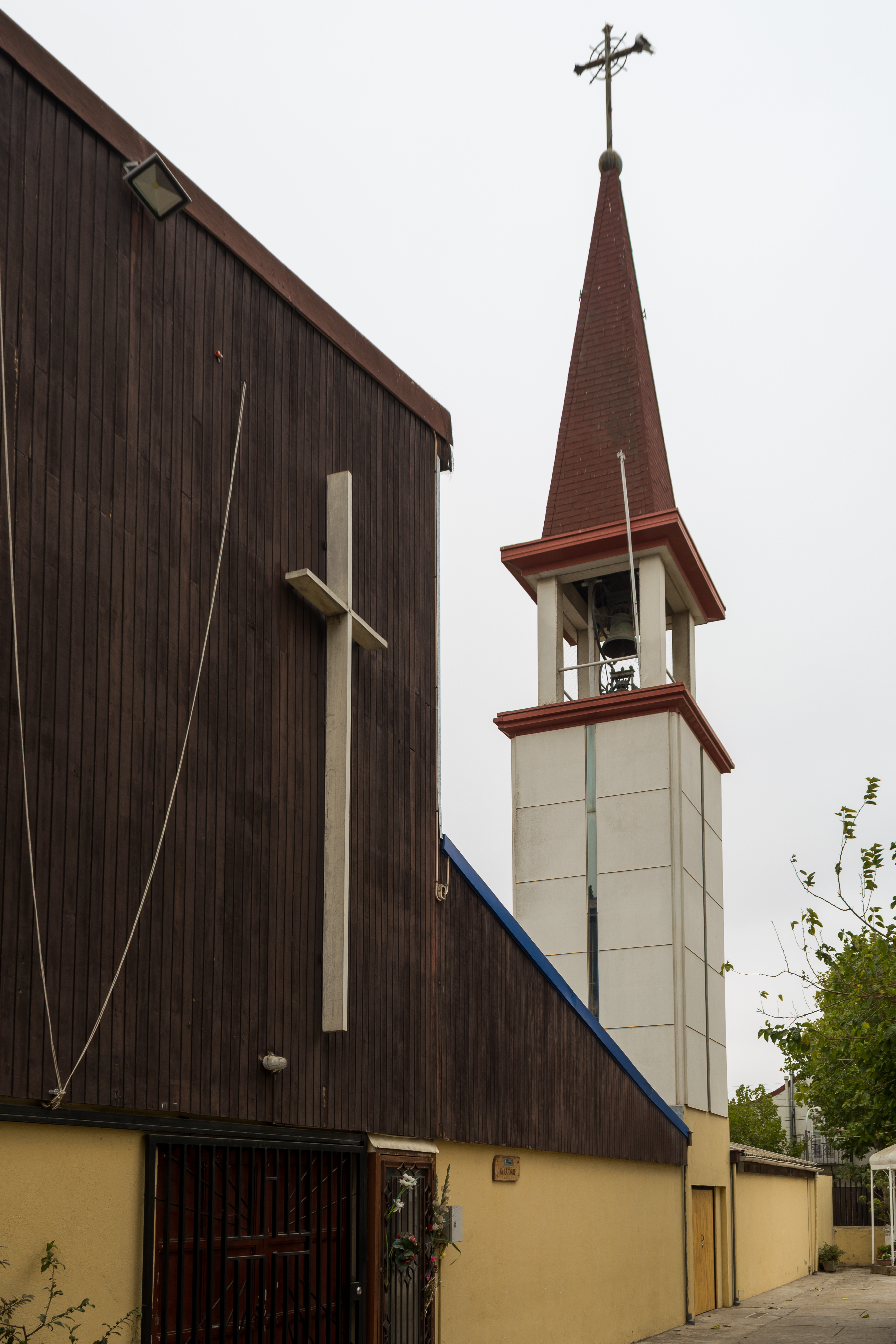 Iglesia de San Felipe Neri, Villa Alemana, Región de Valparaíso, Chile